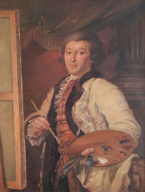 "Tadeusz Kuntze", mal. Irena Bierwiaczonek, 100x76 cm, olej, płótno, 2009, wł. Muzeum Ziemi Lubuskiej w Zielonej Górze.